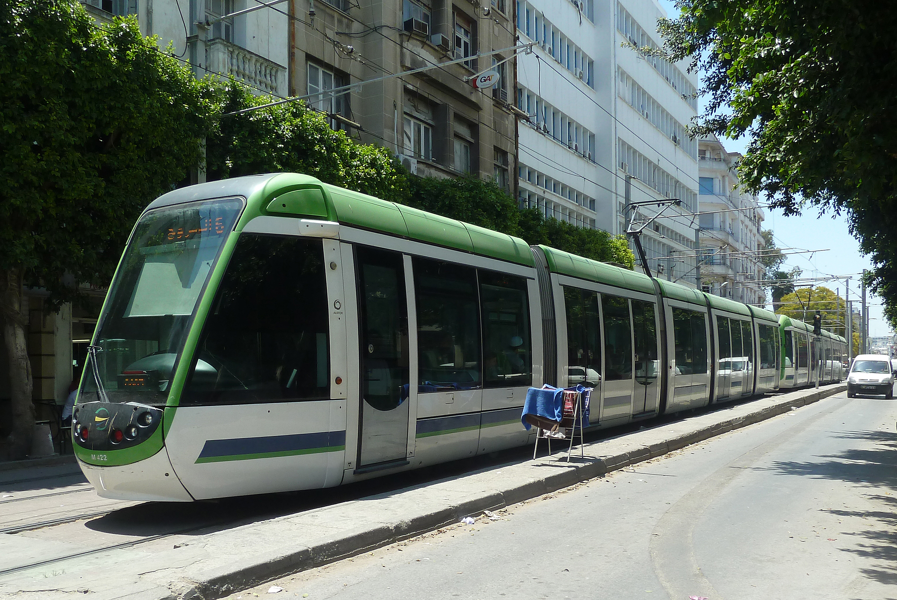 La nouvelle rame 'Citadis' utilisée dans le métro léger de Tunis